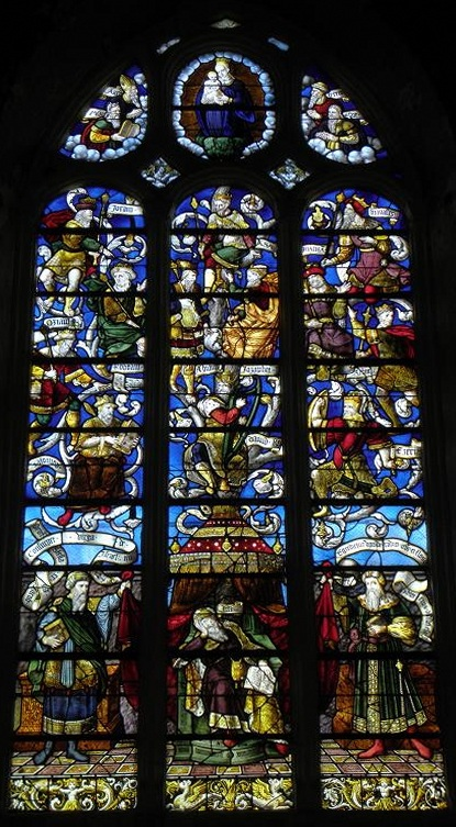 Vitrail de l'Arbre de Jessé de l'église Saint-Martin de Moulins (35).